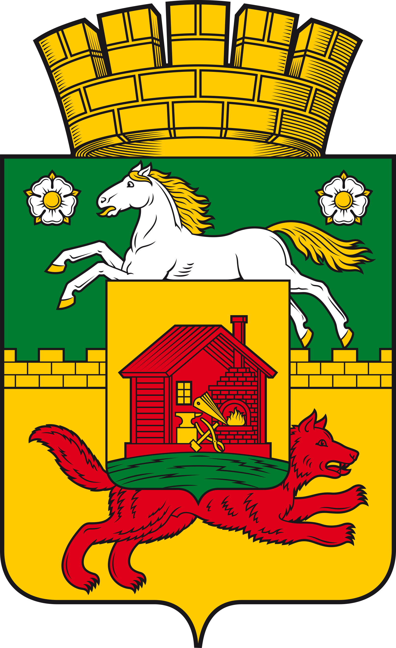 В соответствии с Решением Новокузнецкого городского Совета народных депутатов №4/40 от 03.05.2018 г. в Новокузнецке утвержден новый герб.